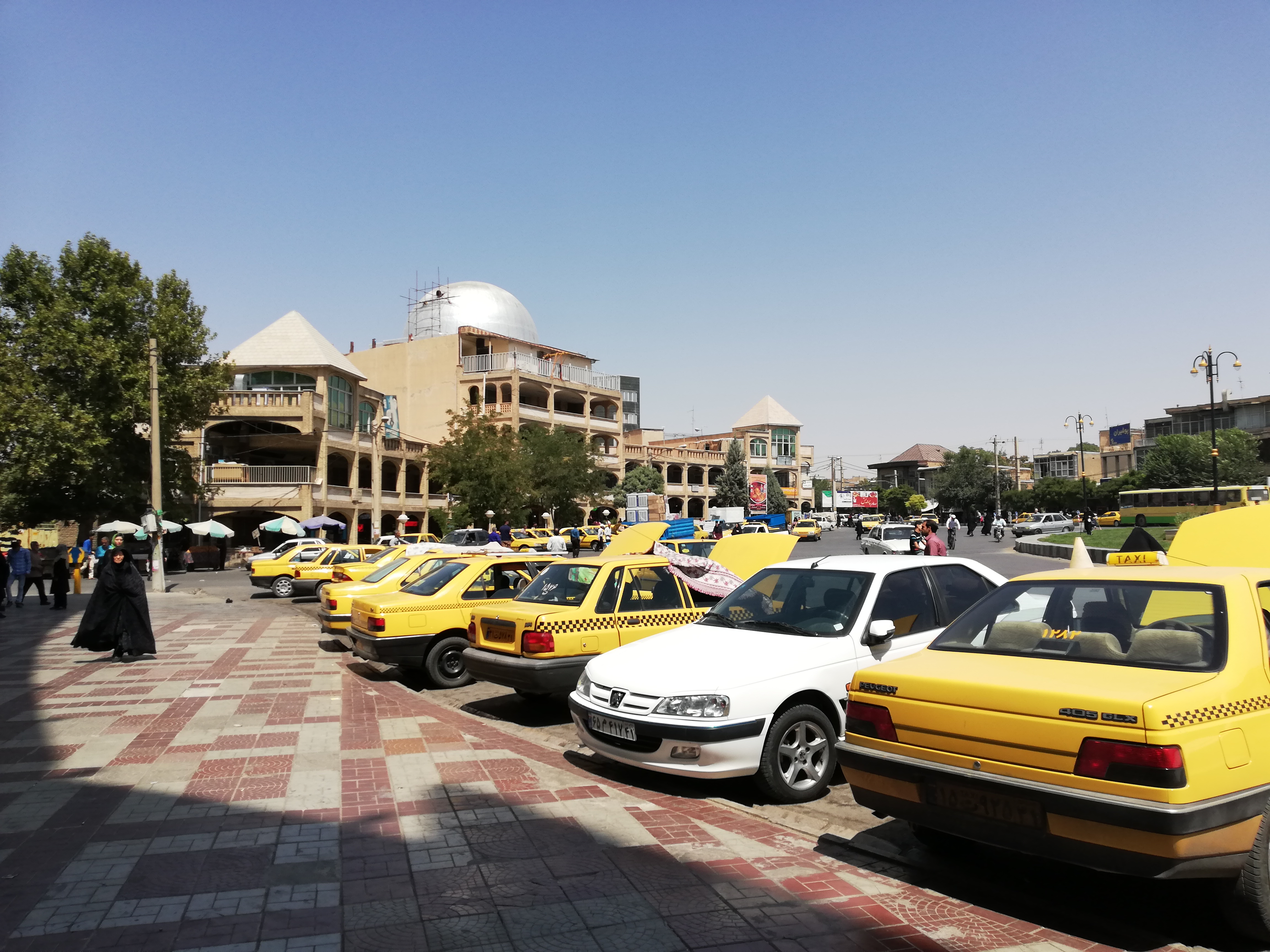 میدان رازان و ساختمان آجری فاز یک گسترش میدان